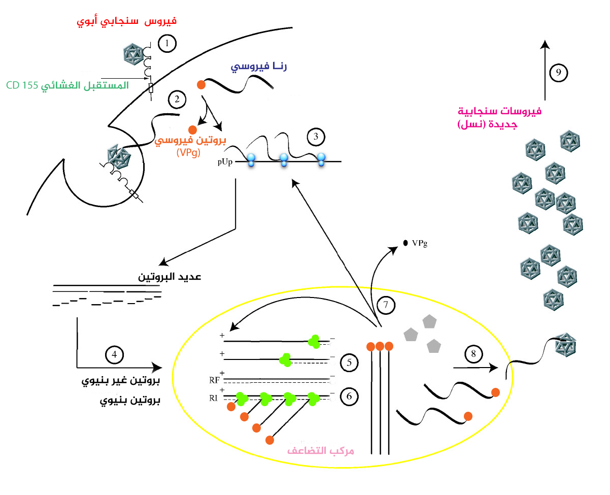 دورة الحياة الخلوية للفيروس السنجابي (فيروس شلل الأطفال). (1) تبدأ بارتباط الفيروس بالجزيء الضخم CD155 في غشاء الخلية والذي يعمل كمستقبل. (2) تتم إزالة كساء الرنا الفيروسي بواسطة زعزعة استقرار قفيصة الفيروس المعتَمِدة على المستقبِل. (3) يتم قص البروتين الفيروسي VPg بواسطة إنزيم فسفودايستراز الخلوي، وتحدث ترجمة الرنا الفيروسي بواسطة آلية مستقلة عن التقبيع (يؤديها IRES). (4) تُنتج معالجة عديد البروتين الفيروسي بالتحليل بروتينات بنيوية وغير بنيوية ناضجة. (5) تعمل سلسلة الرنا موجبة الاتجاه كقالب لتخليق سلسلة مكملة سالبة الاتجاه، ومنه إنتاج رنا مزدوج السلاسل (هيئة قابل للنسخ أو تنسخية RF). (6) بدء نسخ العديد من السلاسل الموجبة من سلسلة واحدة سالبة يُنتِج الوسيط المنتسخ ذو السلسلة المفردة جزئيا الي. (7) أو يرتبط بقفيصات أولية ليخضعا لعملية التقفيص وتحفيز قص البروتين VP0 ونضوجه. (8) والذي في النهاية يؤدي إلى إنتاج فيروسات سنجابية جديدة (ذرية). (9) انحلال الخلية المصابة بالعدوى يحرر فيروسات الجديدة المُعْدِية.